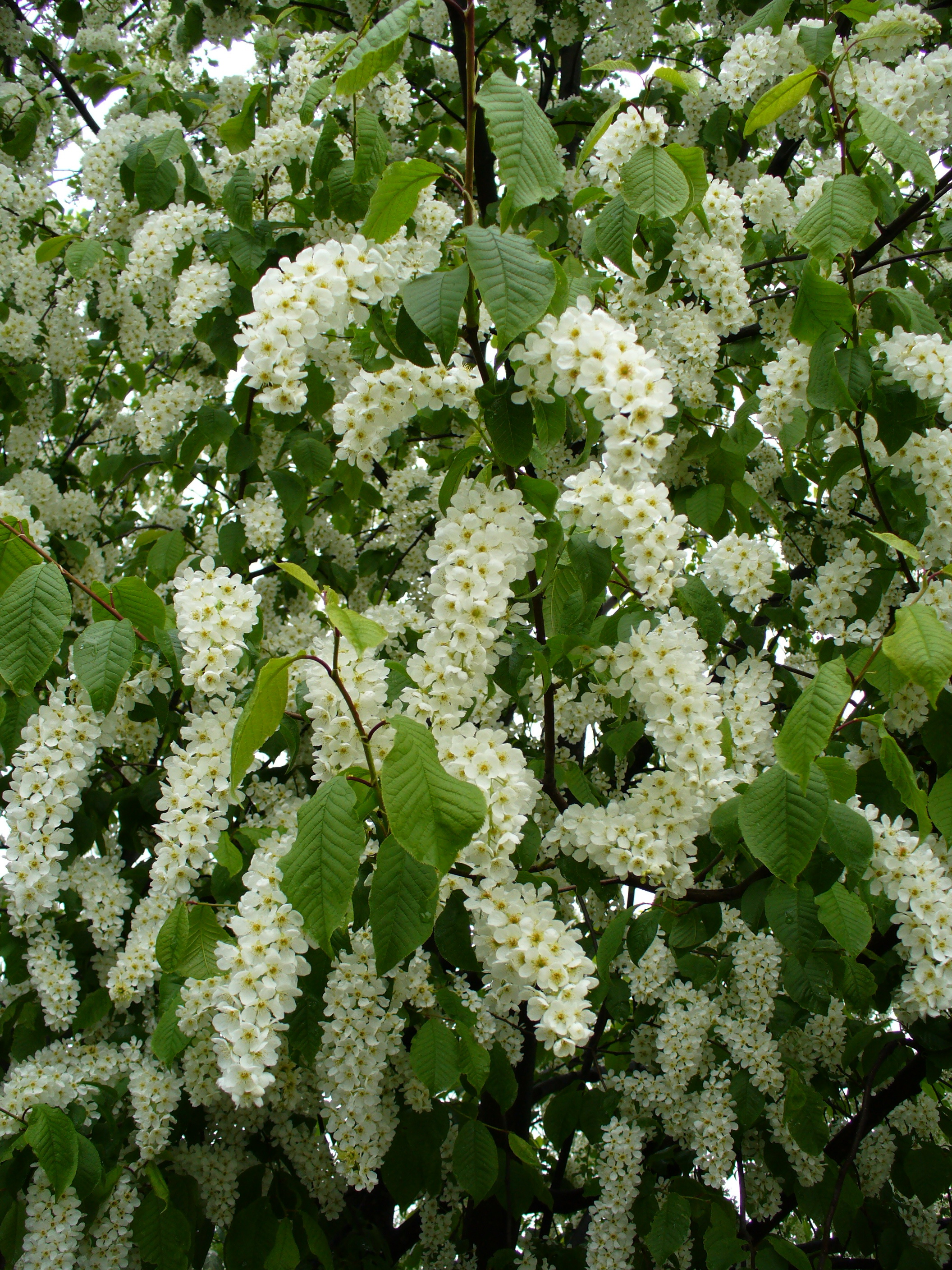 Orgonafa - Béke utca 3